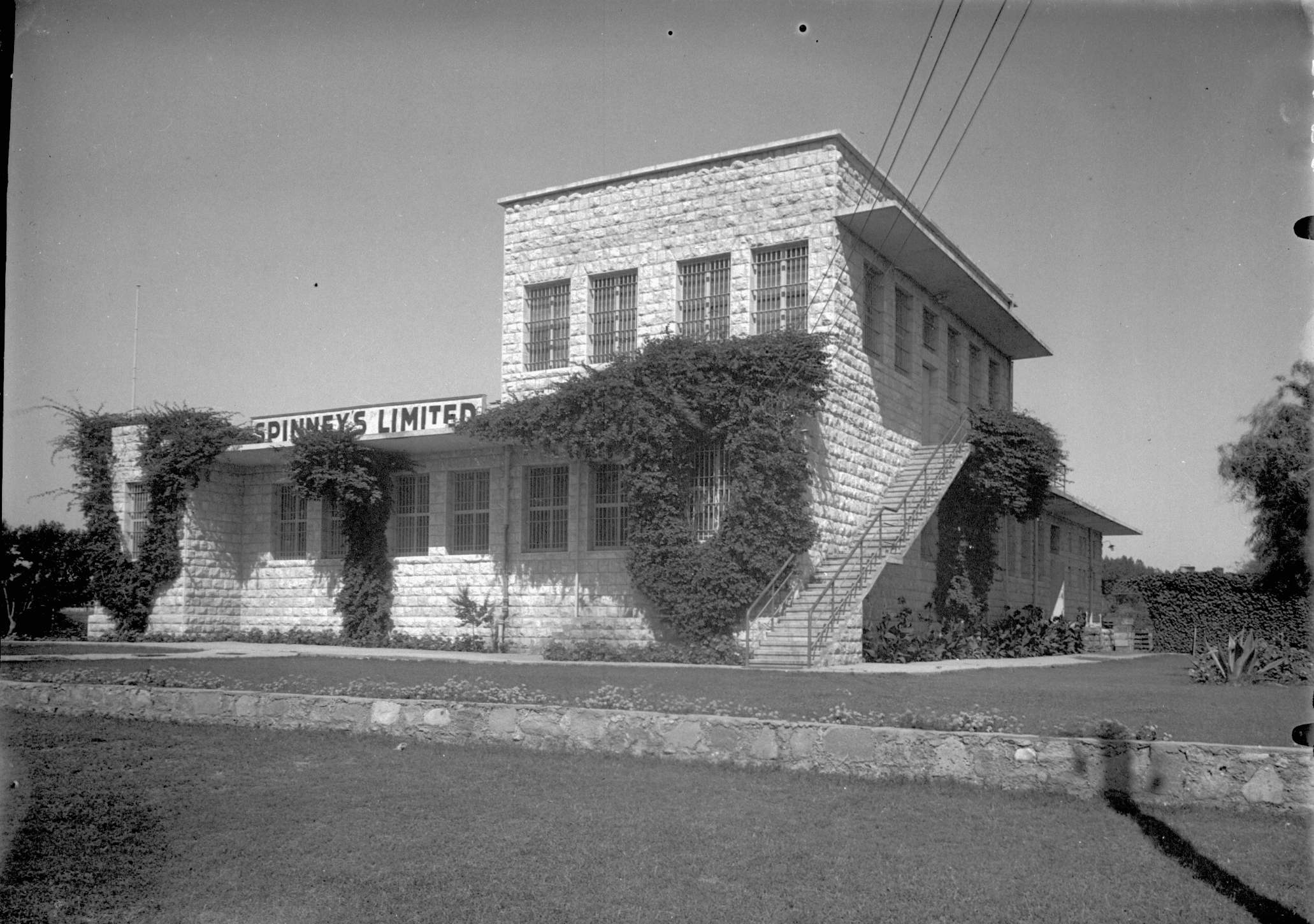 אוסף צילומים של הצלם זולטן קלוגר טווח מספרי התשלילים 15056 - 15082: Spinney's Mineral Water Factory (מפעל לייצור מים מינרליים ומשקאות קלים בעכו)